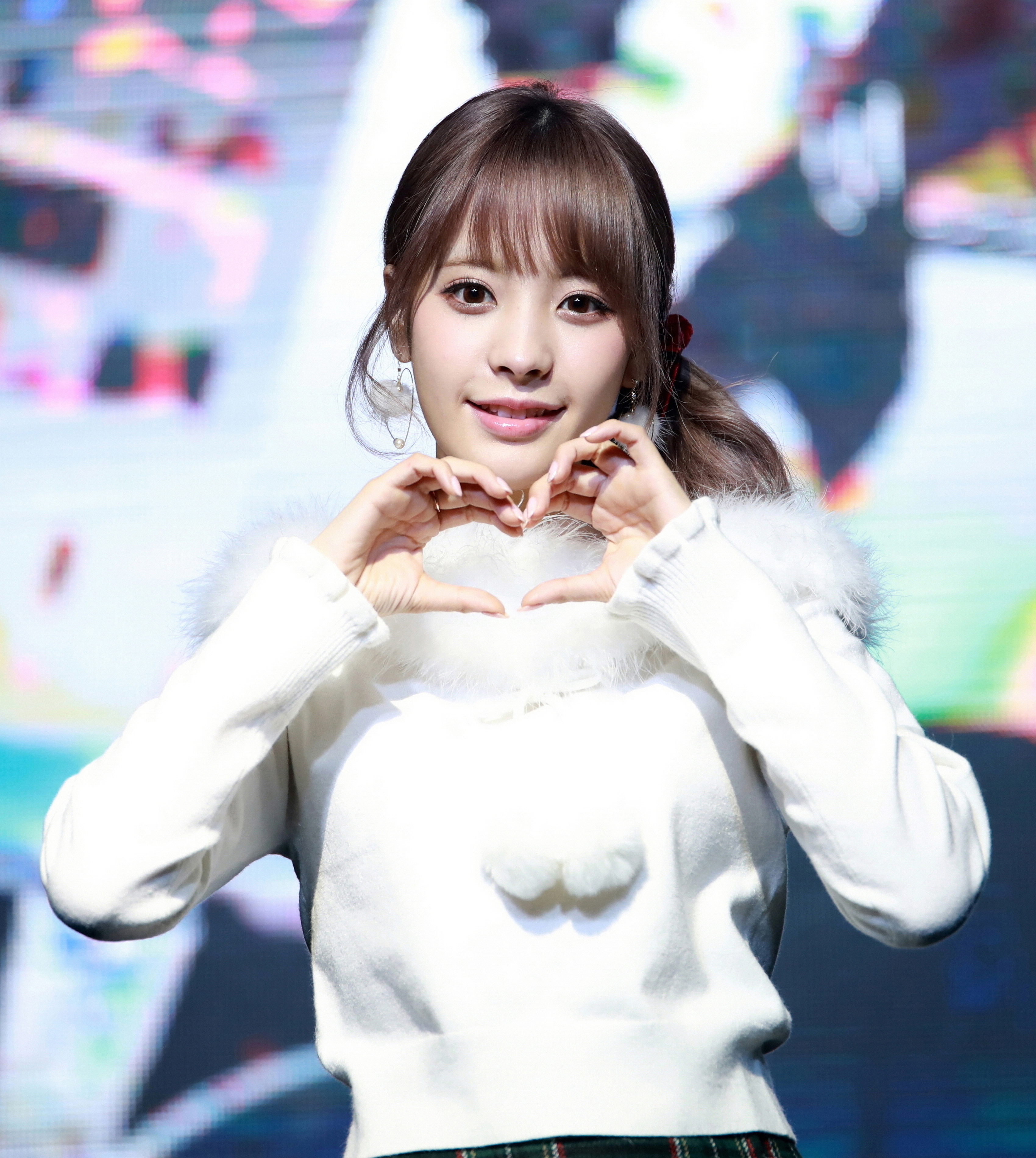 171209 桃乃木かな(모모노기 카나) 2017 FAN MEETING in SEOUL (First Kiss)2部 写真 ♡桃乃木かな♡